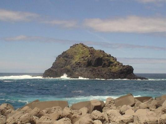 Roque Garachico